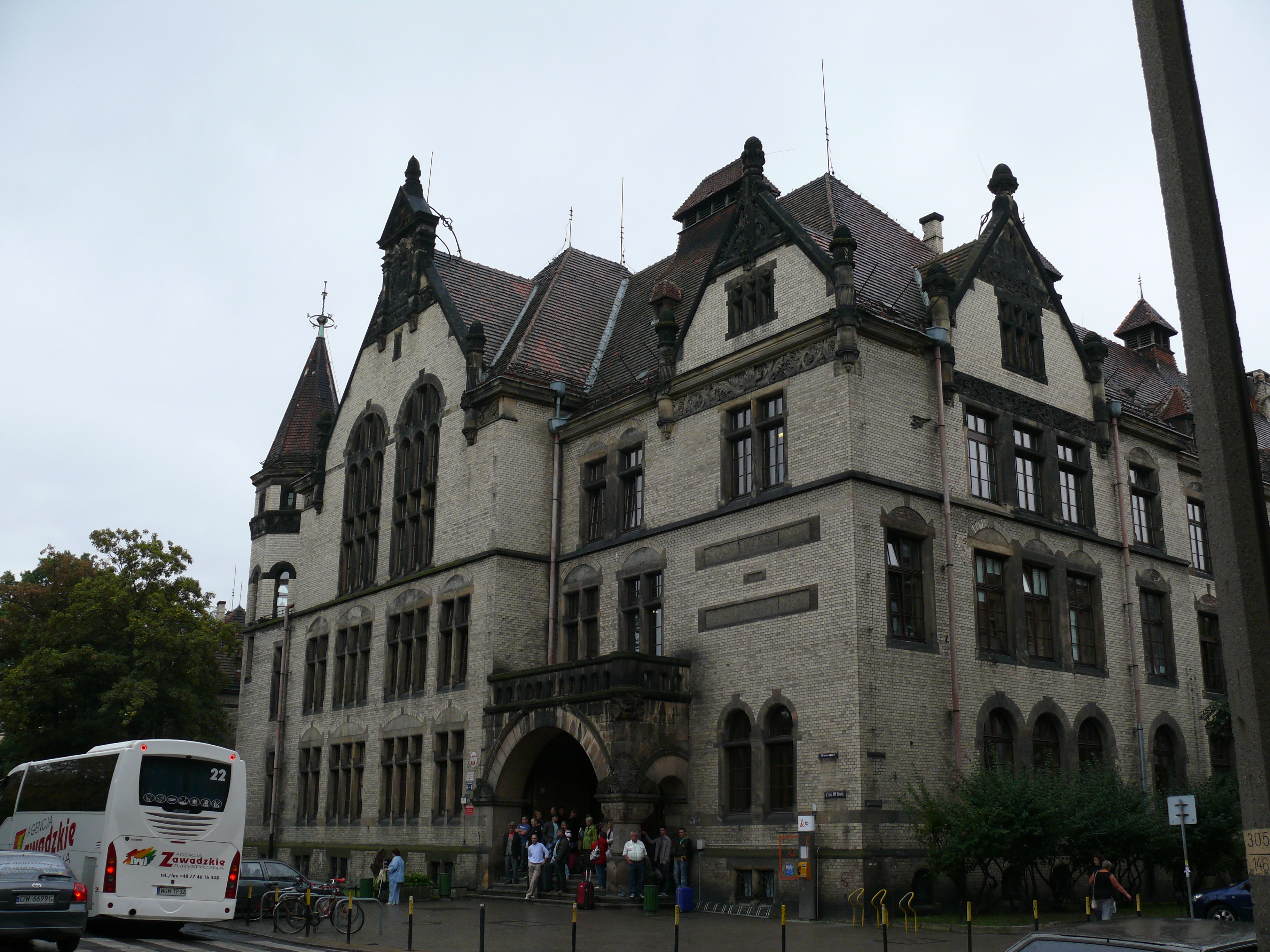 Wrocław ul. Dawida 1